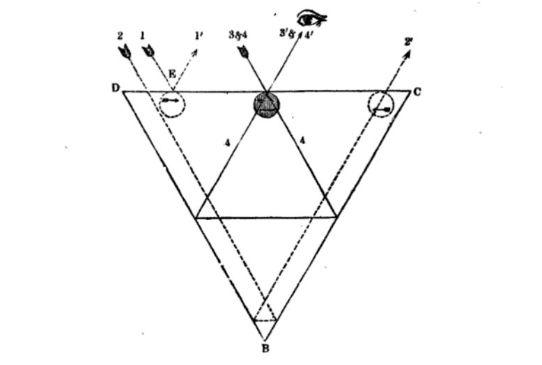 Dipleidoscopio de Edward John Dent (1790–1853) Imagen de su obra: Título A Description of the Dipleidoscope, Or Double-reflecting Meridian and Altitude Instrument: With Plain Instructions for the Method of Using it in the Correction of Time-keepers, Volumen 7 A Description of the Dipleidoscope, Or Double-reflecting Meridian and Altitude Instrument: With Plain Instructions for the Method of Using it in the Correction of Time-keepers, Edward John Dent Autor Edward John Dent Edición 8 Publicado en 1867 Procedencia del original Universidad de Oxford Digitalizado 6 Ene 2009 N.º de páginas 29 páginas